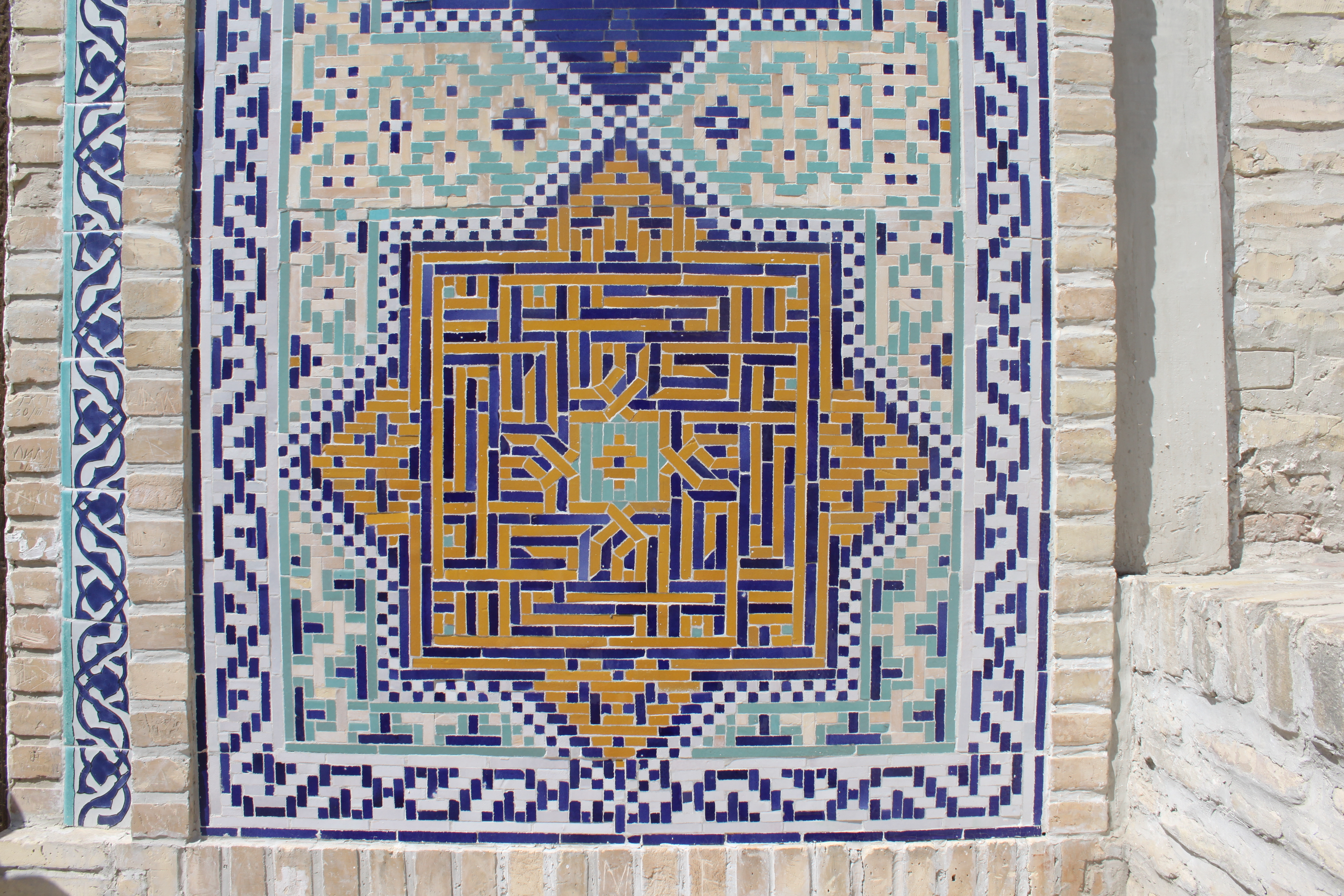 Detail du portail à la sortie de la salle de reception